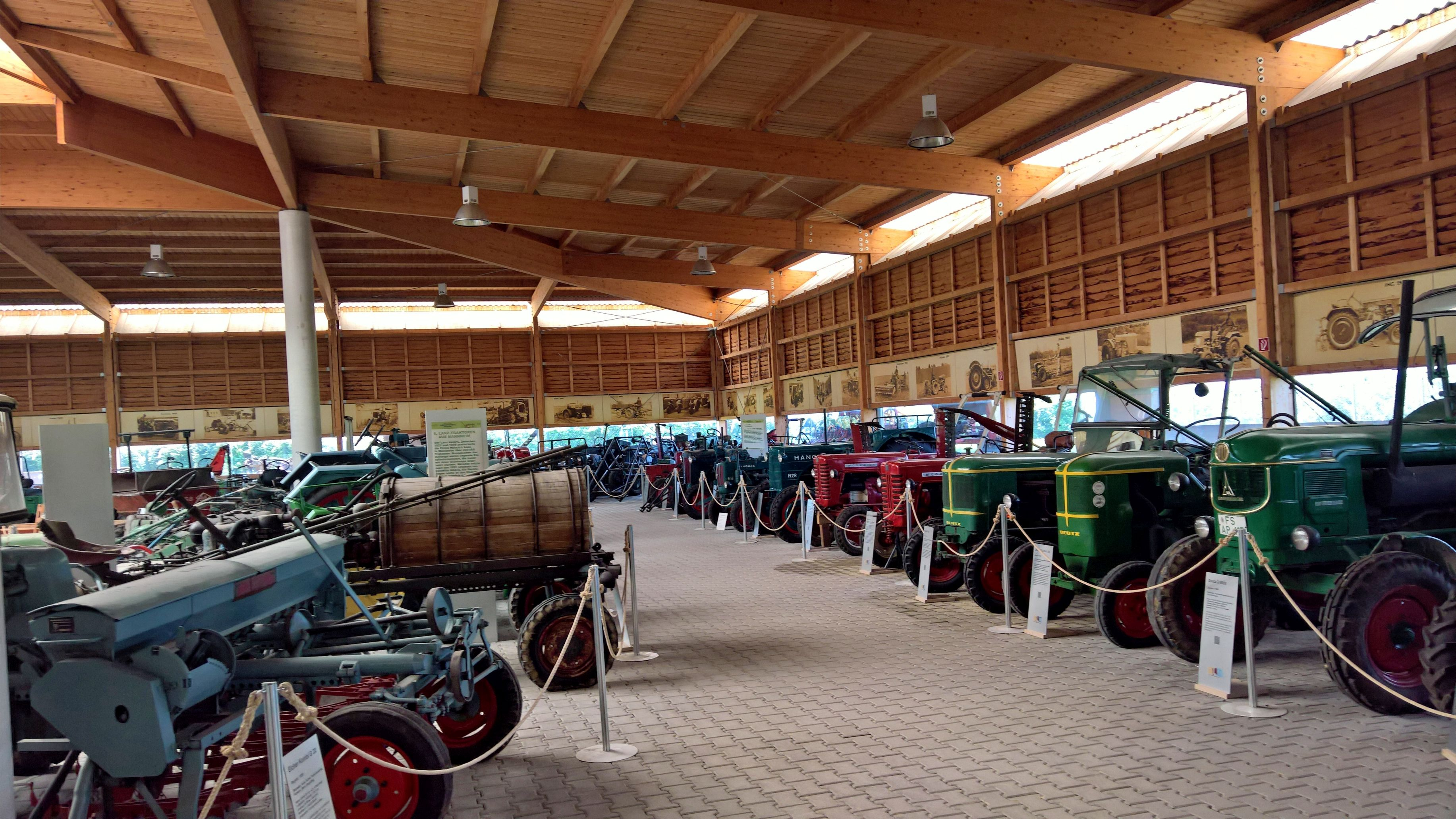 Bilder aus dem Deutsches Landwirtschaftsmuseum in Hohenheim (Stuttgart)